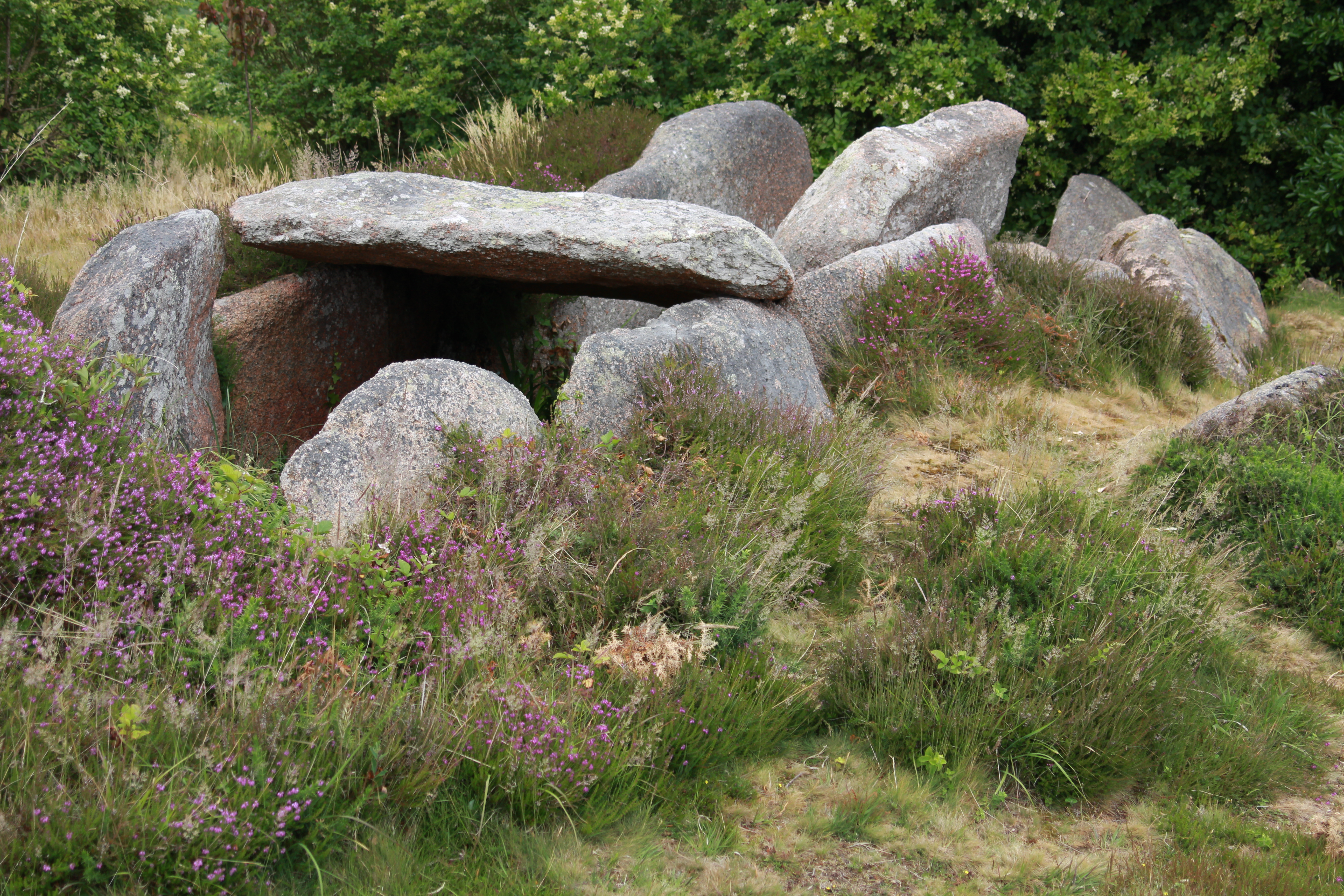 Comme on peut le voir sur la photo, il s'agit d'une allée couverte en ruine dénommée 'dolmen' dans le classement MH Elle est située sur un terrain privé avec une servitude d'accès, à Trégastel, Côtes d'Armor